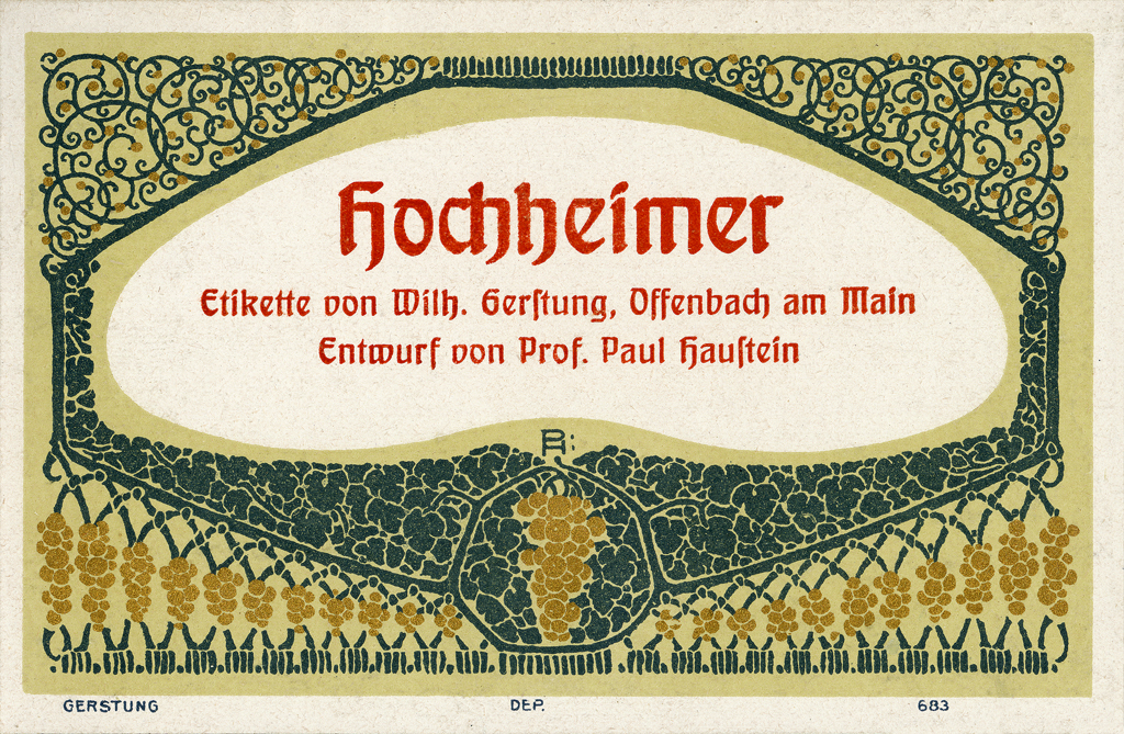 Weinetikett von Wilhelm Gerstung, gestaltet von Paul Haustein, mit dem Monogramm Paul Hausteins "PH"